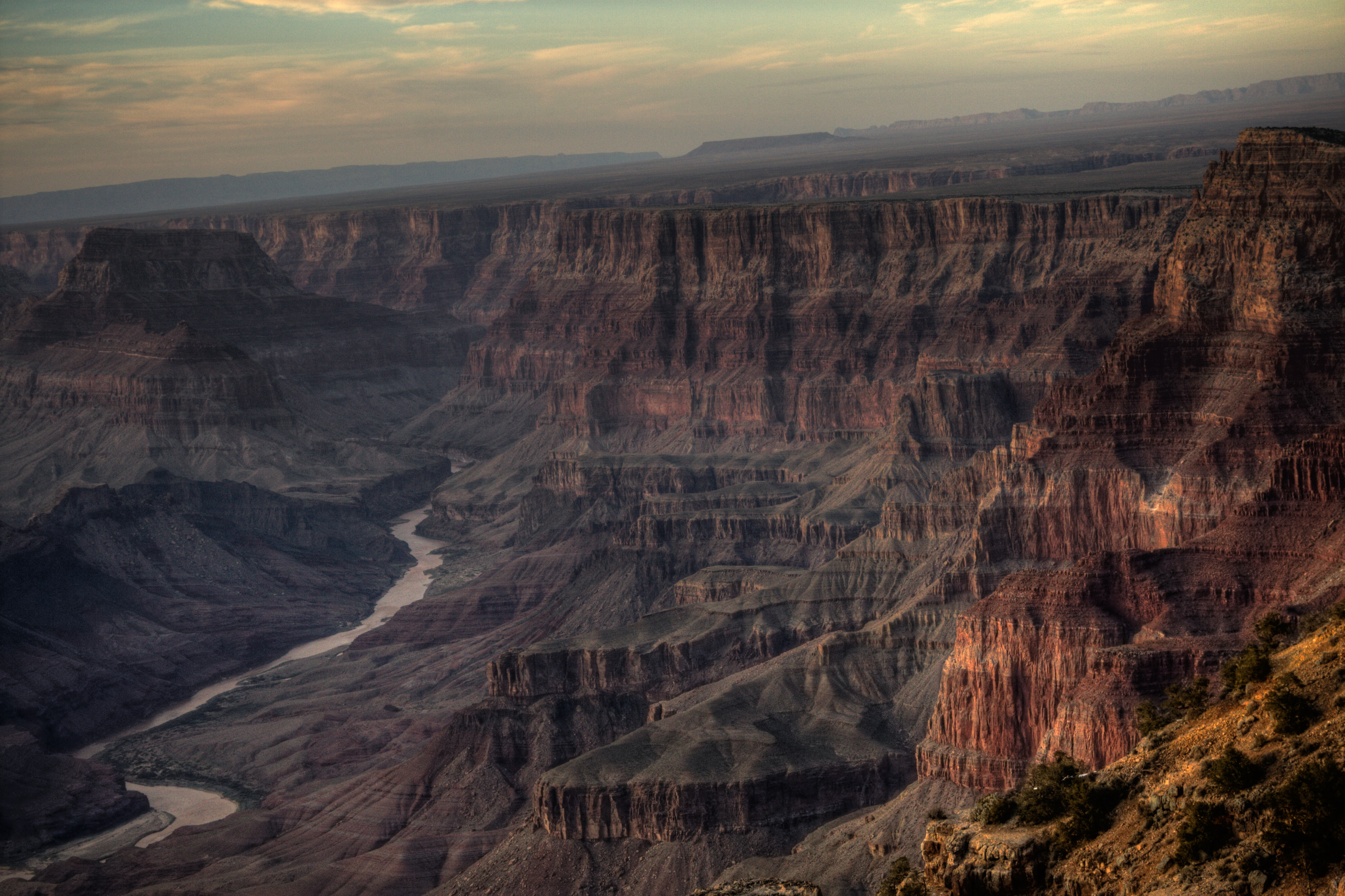 Con rocas de hasta 1,840 millones de años, el cañón se formó en apenas 6 millones de años. La efímera caricia de un río a su inmortal amante de roca.